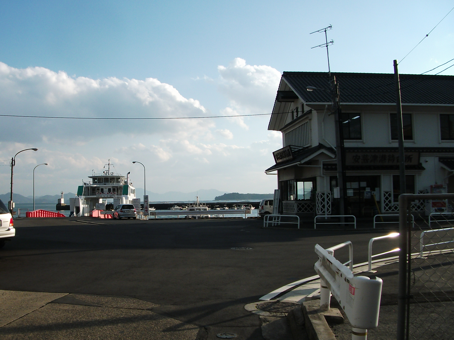 広島県東広島市、安芸津港